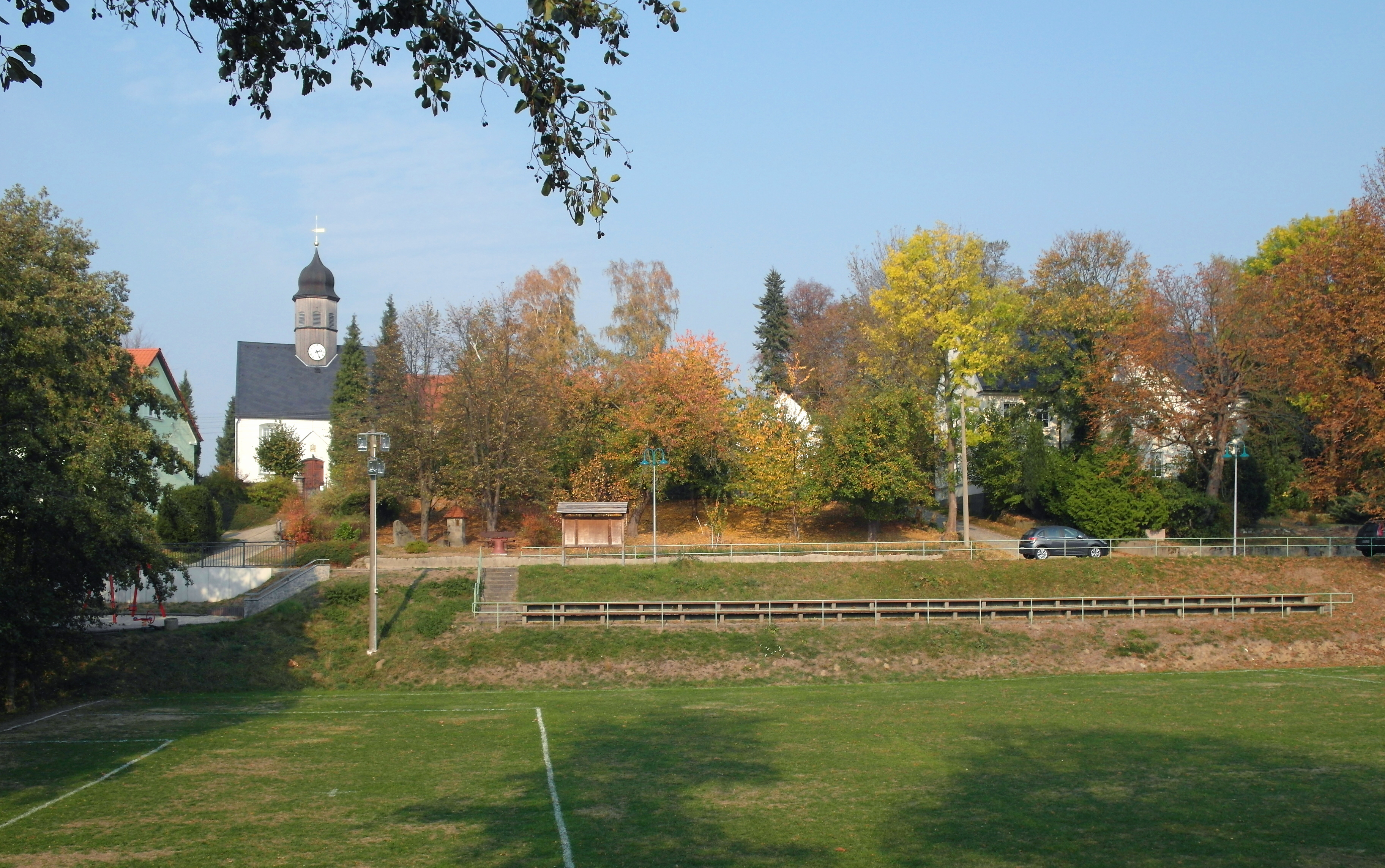 18.10.2018 01833 Lauterbach (Stolpen), Dorfstraße 53 (GMP: 51.067278,14.118169): Panorama von Süden über den Sportplatz zur St.-Martins-Kirche (GMP: 51.067278,14.118169) und dem rechts etwas von Bäumen verdeckten Pfarrhof (GMP: 51.066976,14.118587). [SAM6369.JPG]20181018300DR.JPG(c)Blobelt